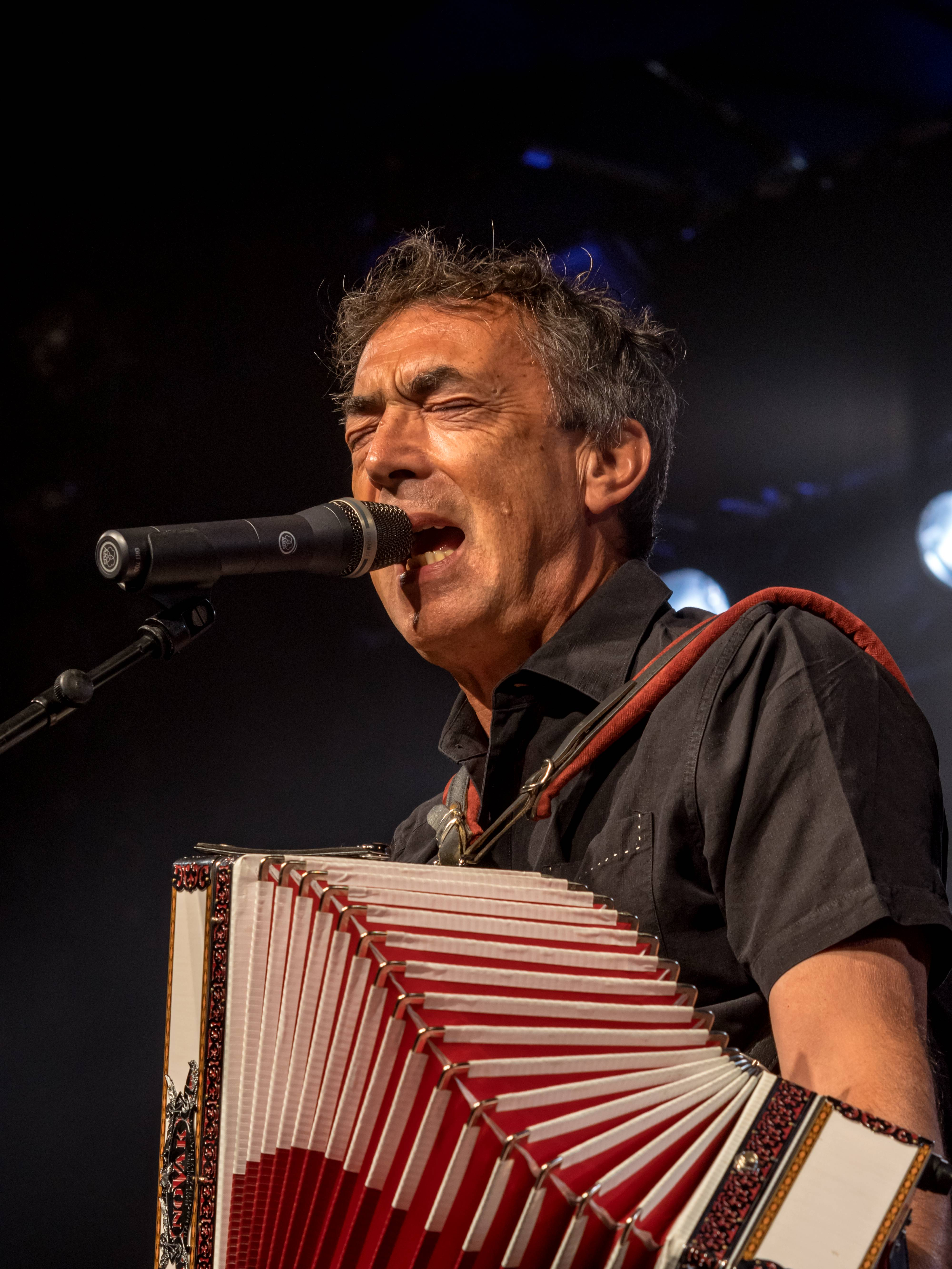 Bilder vom ZMF 2015 Hubert von Goisern